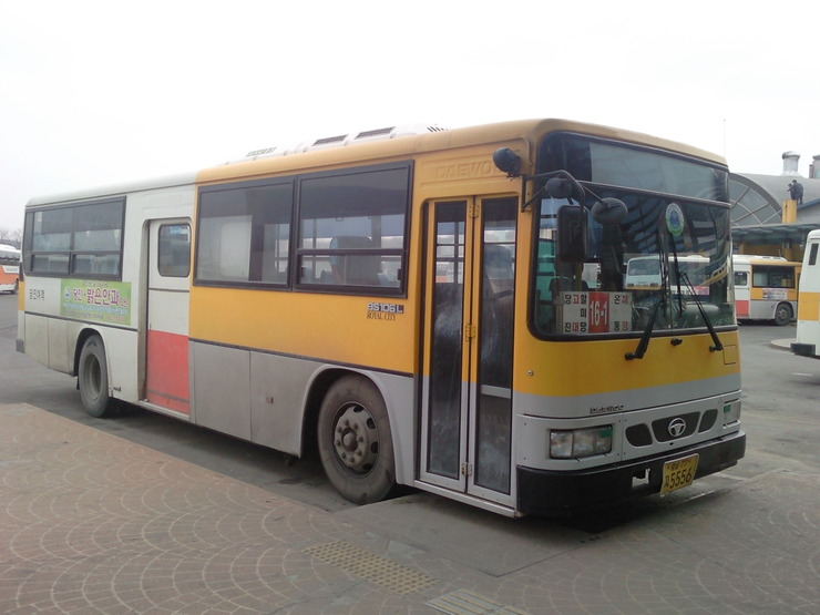 당진군 농어촌버스 16-1번